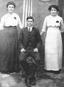 Germans from Helenendorf (Azerbaijan)